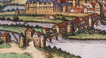 Hann. Münden 1584 Kupferstich von Frans Hogenberg